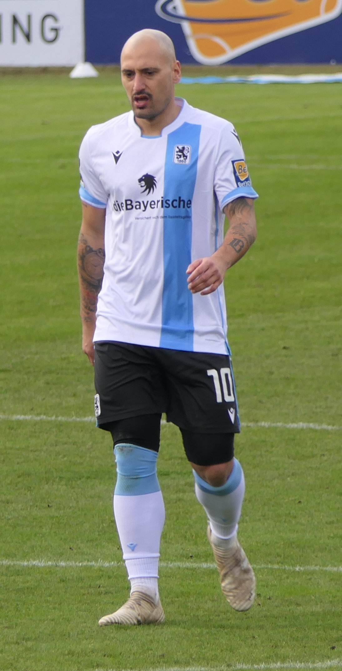 Der Fussballprofi Timo Gebhart im Trikot vom TSV 1860 München beim Heimspiel gegen Eintracht Braunschweig am 26.01.2020.